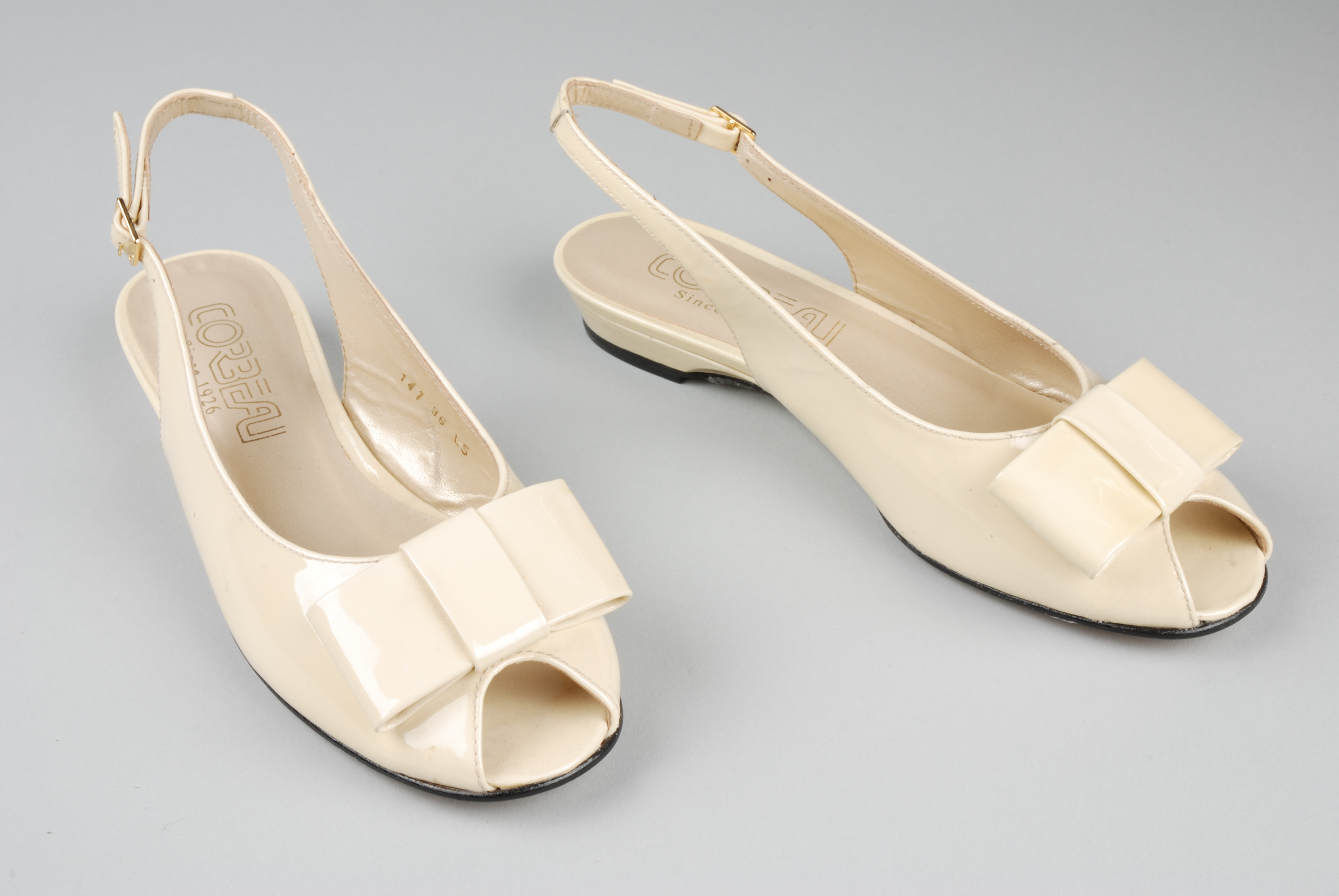 Objectgegevens Titel: Paar damesschoenen, beige, lage hak, slingback, “Corbeau” Beschrijving: Paar damesschoenen, beige, lage hak, slingback verstelbaar met gesp, open teen met strik op de neus. Plastic sticker op leren zool rechterschoen. Maat 36. Herkomst: schoenenwinkel Corbeau, West-Kruiskade 2, Rotterdam Trefwoorden: pump, schoen, schoeisel, vrouwenkleding, kledingaccessoire, kostuum Opschrift / merk: Zool: "All / genuine / leather / Made in Spain / Lola Shoes / 36 (maat)". Binnenkant: "Corbeau / Since 1926 / 141 36 LS". Vervaardiger: Corbeau Plaats vervaardiging: Spanje Datering: 2008 - 2009 Technieken: textiel Materiaal: leer, lakleer, kunststof, plastic, elastiek, metaal Afmetingen: (cm) hg 8,5 / br 8,1 / dp 24,0 Associatie: kleden, vrouw, schoenenwinkel, winkel, Corbeau, Rotterdam, Stadscentrum, Oude Westen, West-Kruiskade, bedrijf Vorm & decoratie: kleding Inventarisnr: Museum Rotterdam 87052-1-2